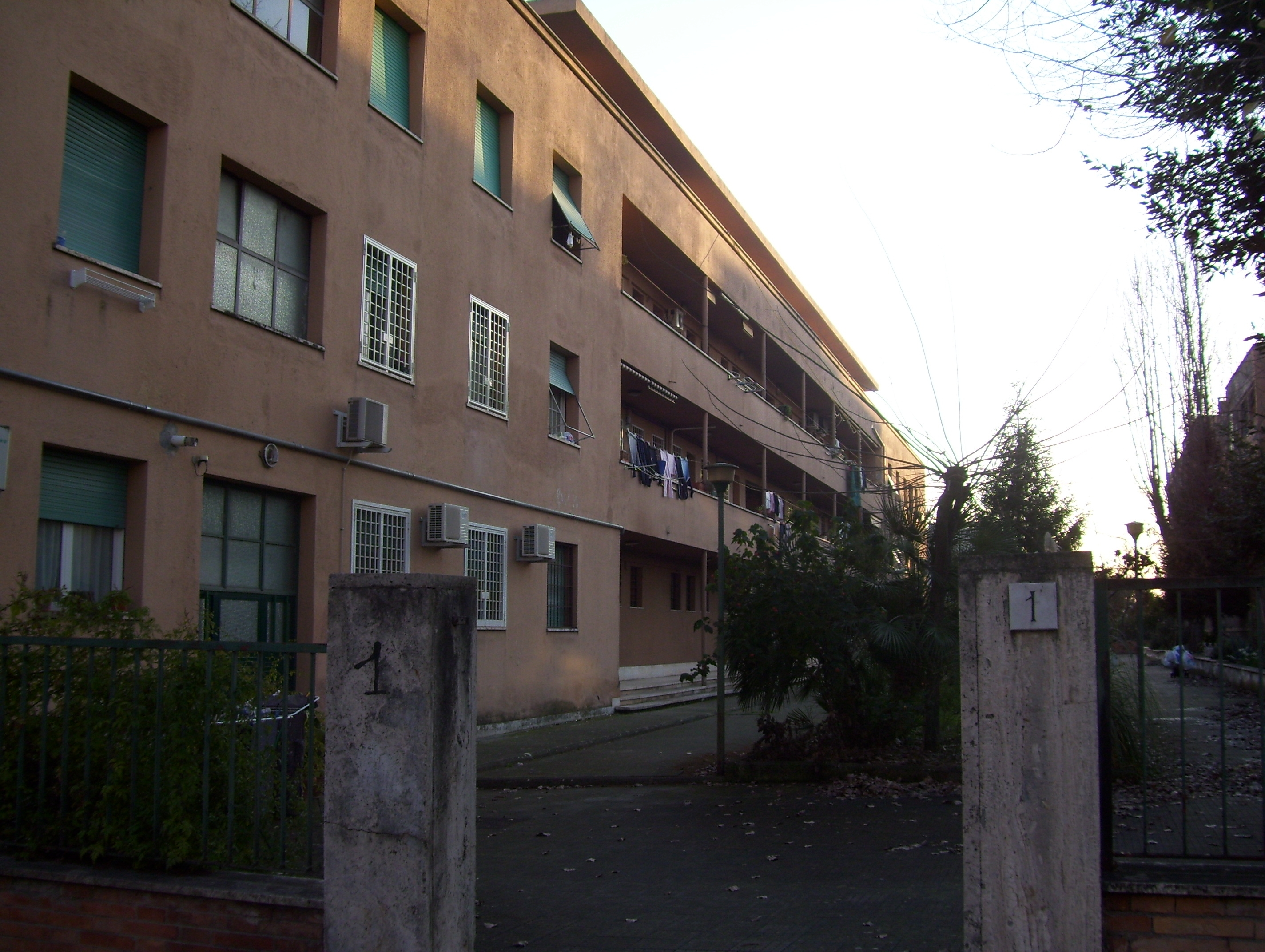 Case popolari di Guidonia in via Tiberio Cavallo, costruite tra il 1935 e il 1937 con il progetto originale della città di fondazione.